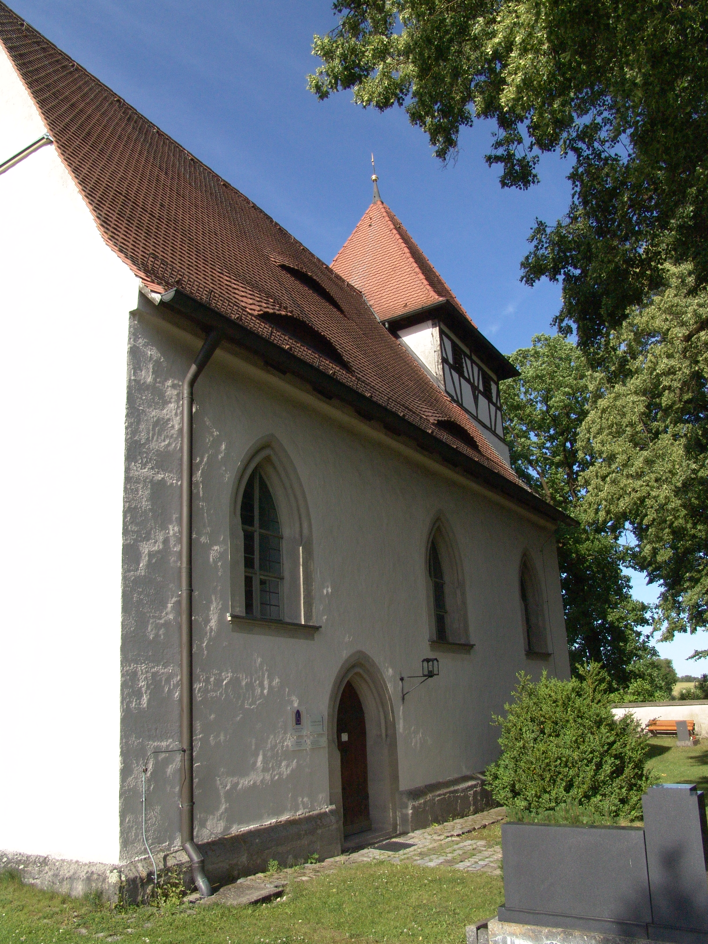 Pretzdorf, Evangelische Kirche